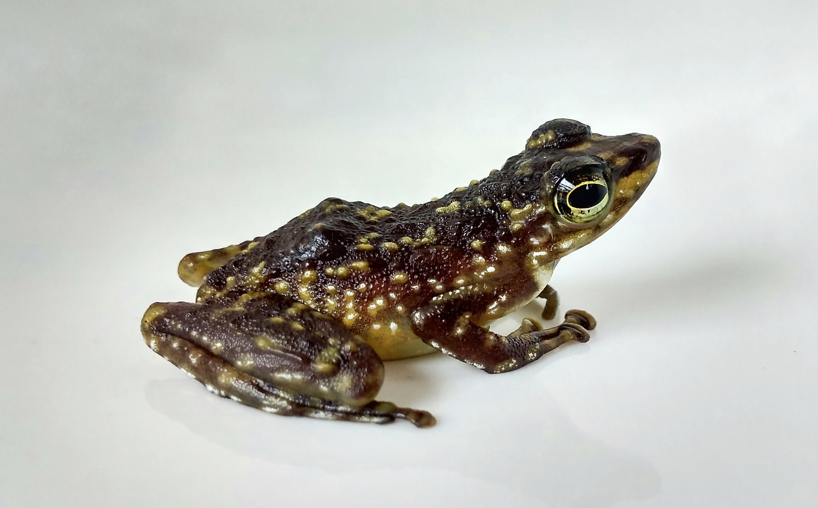 Staurois parvus adalah bagian kecil dari genus Staurois. Sebelumnya takson ini telah dimasukan dalam Staurois tuberilinguis, tetapi Matsui (2007) berpendapat bahwa katak ini adalah spesies yang berbeda dari S. tuberlinguis. Terkait dengan S. tuberlinguis (baru-baru ini dikonfirmasi oleh Arifin dkk, 2011). Bahwa S. parvus memiliki moncong pendek (di bandingkan dengan diameter mata) dan ukuran tubuh yang kecil (jantan berkisar 20-24 mm Snout Vent Lenght, Betina 26-31 mm). S. parvus telah tercatat dari Brunai, Serawak, Sabah dan Kalimantan. Seperti Spesies lain dalam genus ini, Staurois parvus menggunakan penandaan kaki (foot-flagging) untuk komunikasi intraspesifik. Sumber